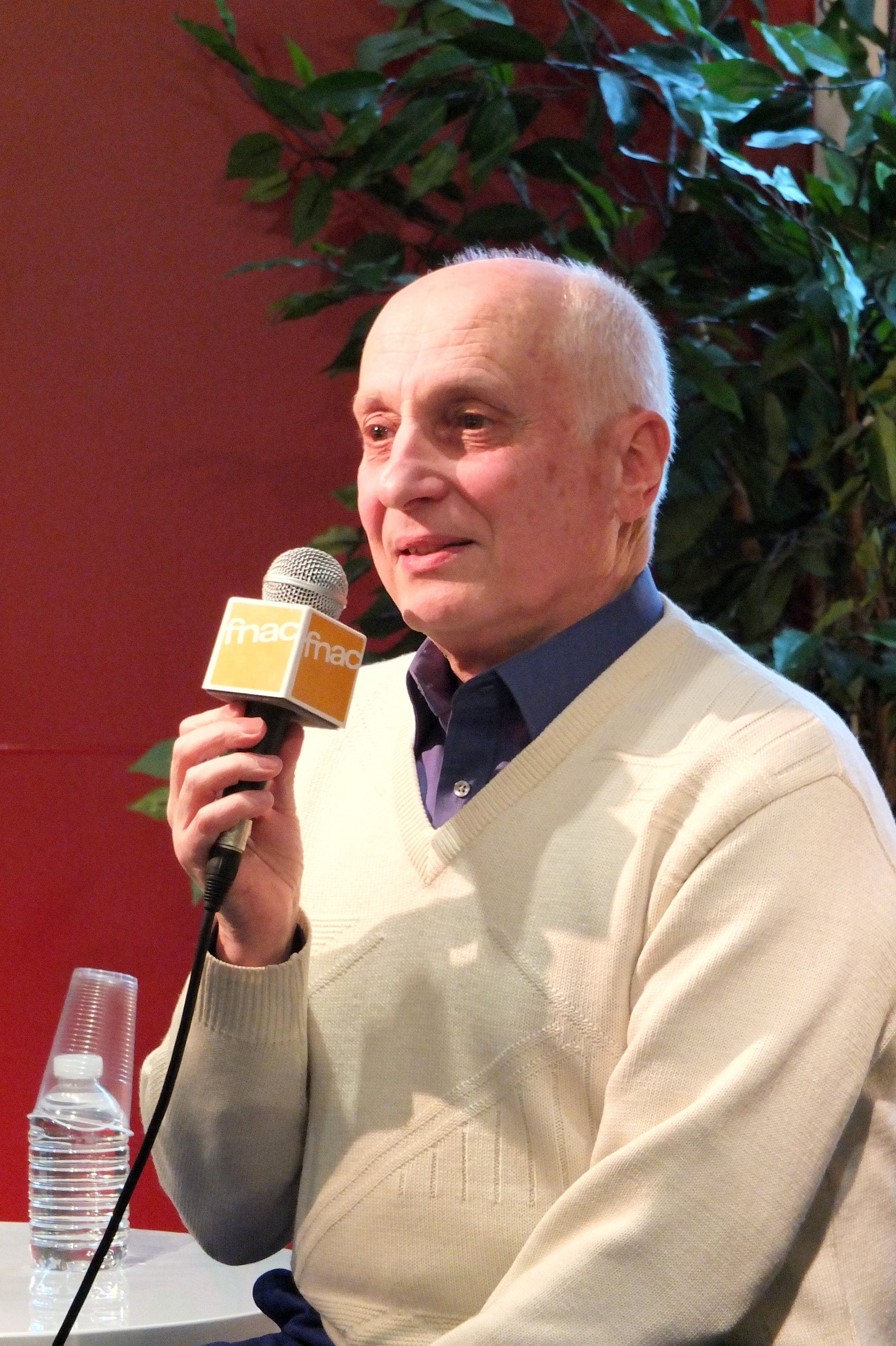 Michel Ocelot, lors de la présentation du DVD de Kirikou et les hommes et les femmes, le 16 février 2013 à la FNAC des Ternes (Paris 17e arrond.).